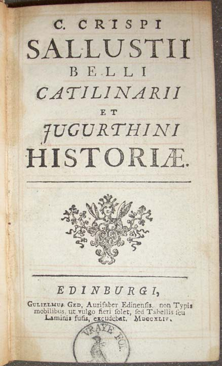 Frontespizio del de Catilinae Coniuratione e del Bellum Iugurthinum pubblicato in stereotipia da William Ged a Edimburgo nel 1744. Sotto il nome della città si legge «Guliermus Ged, aurifaber Edinensis non typis mobilis ut vulgo fieri solet, sed tabellis seu laminis excudebat»